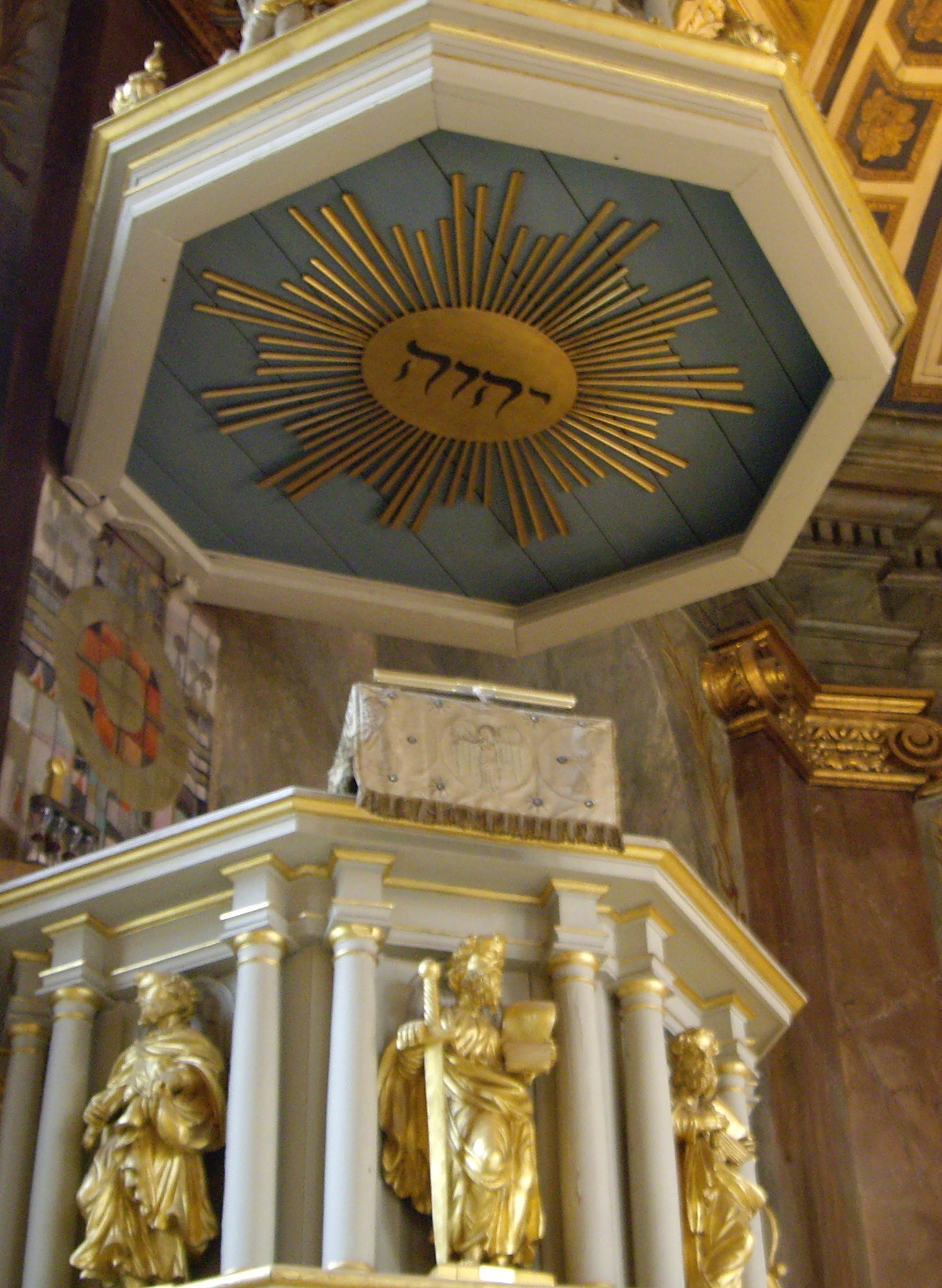 Predikstolens solsymbol med tetragrammet JHWH i Hedvigs kyrka, Norrköping